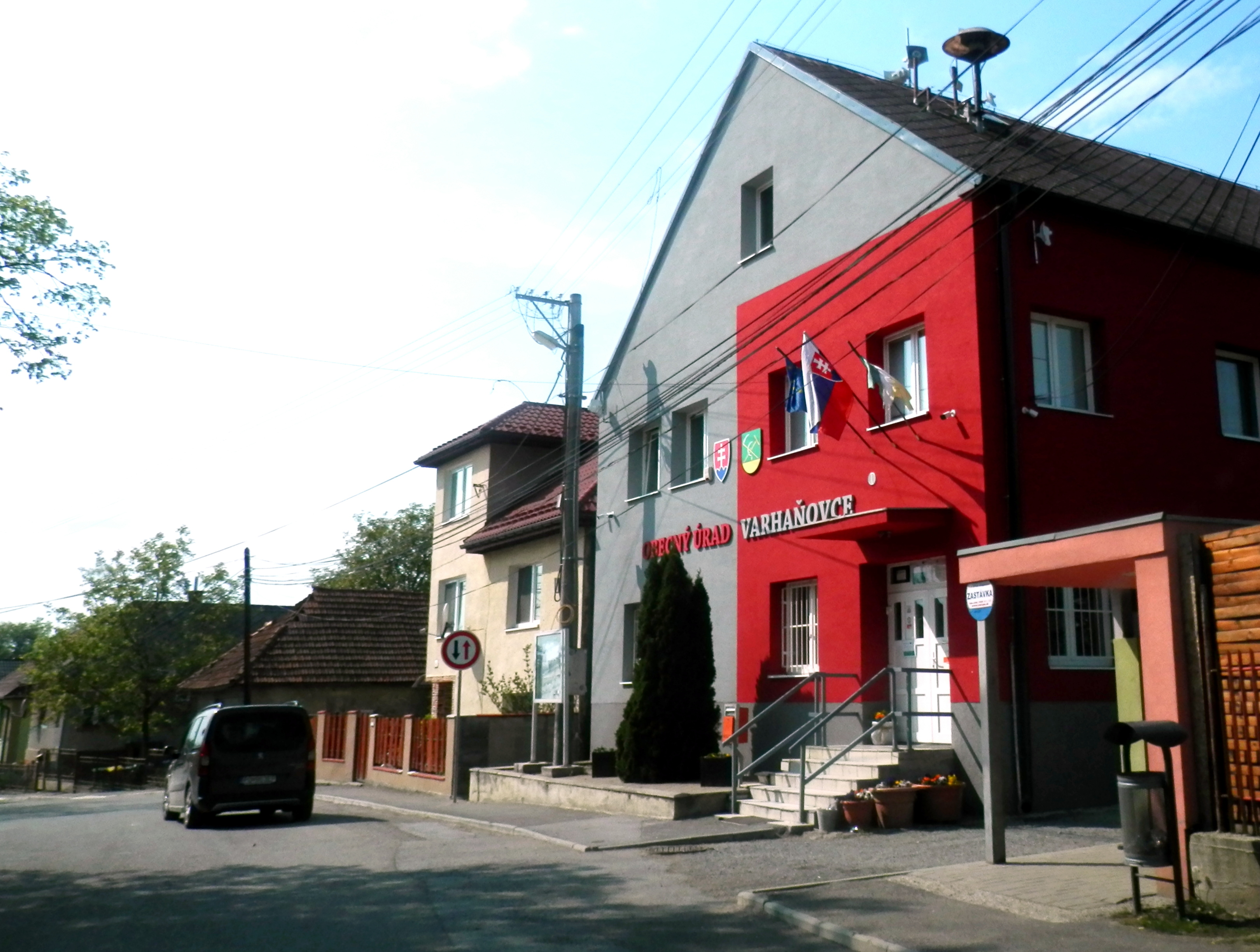 Jar 2018. Intravilán obce Varhaňovce, okres Prešov. Slovensko